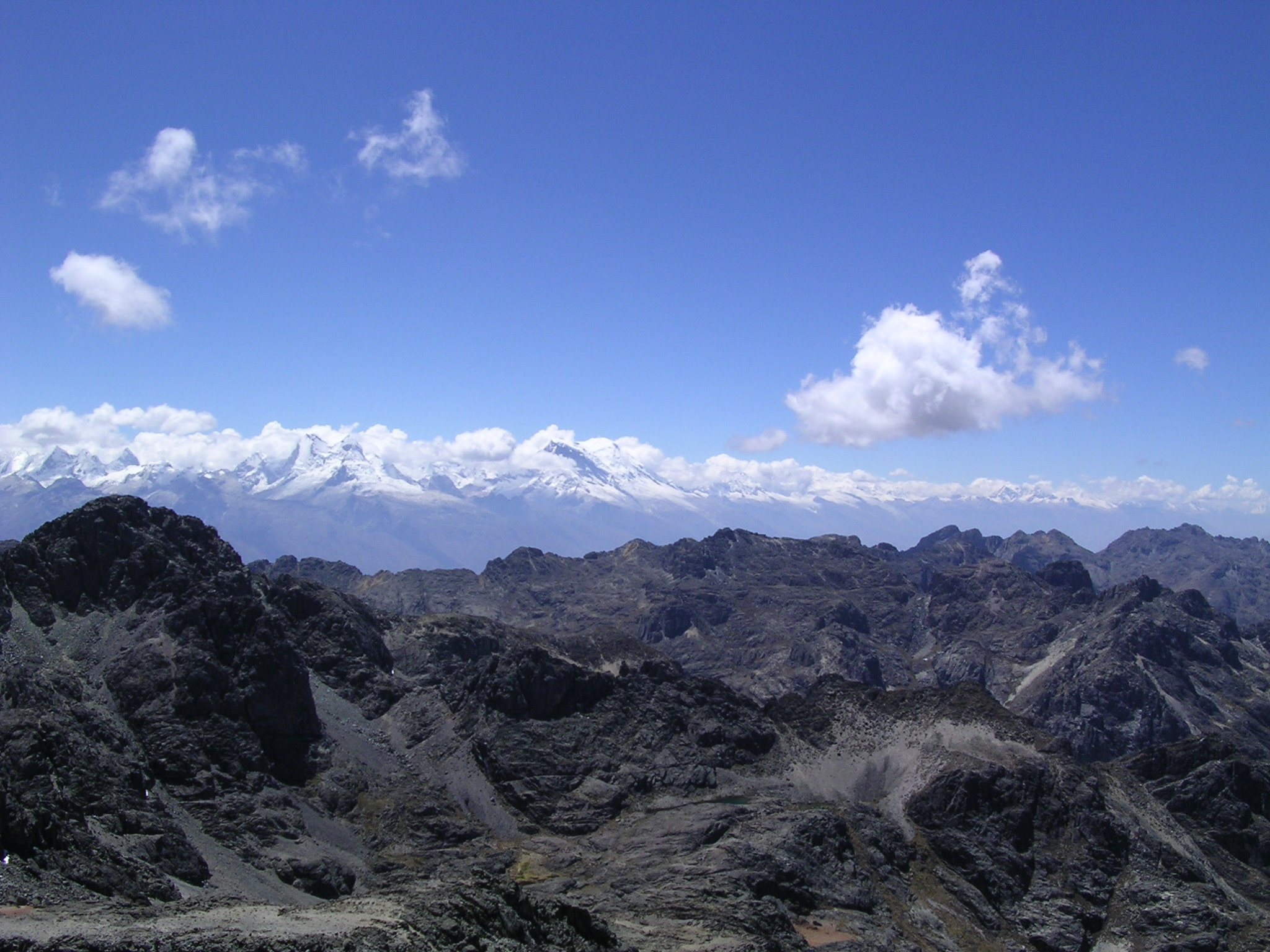 Cordillera Blanca y Cordillera Negra, Perú. Se intuye el Callejón de Huaylas entre las dos cordilleras. Destaca en el centro el Huascarán, nevado más elevado de los Andes peruanos (6768). La Cordillera Negra es el mejor palco para observar la Cordillera Blanca en toda su extensión.